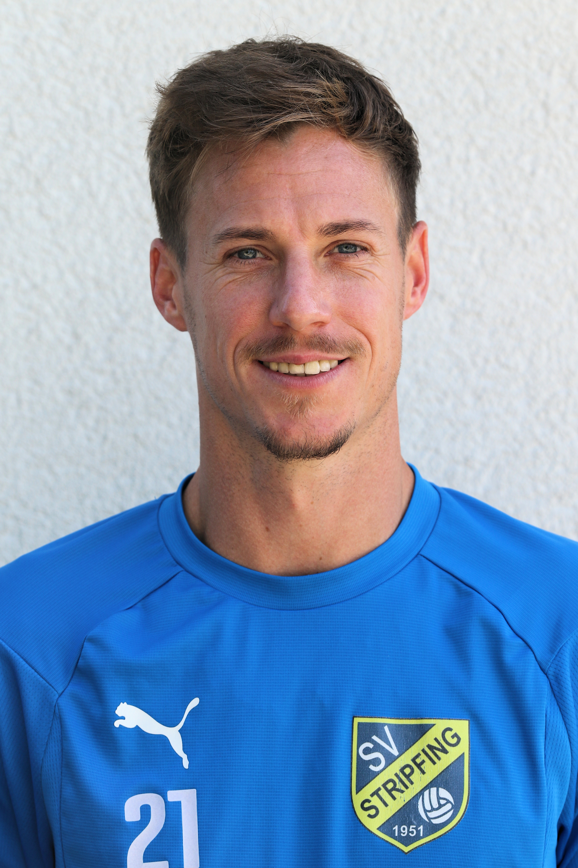 Meisterschaftsspiel der Regionalliga Ost 2019/20 SC Wiener Neustdat (weiße Trikots) gegen SV Stripfing (gelbe Trikots) am 17. August 2019 1:1 (1:0). – Das Bild zeigt Marco Miesenböck (SV Stripfing).